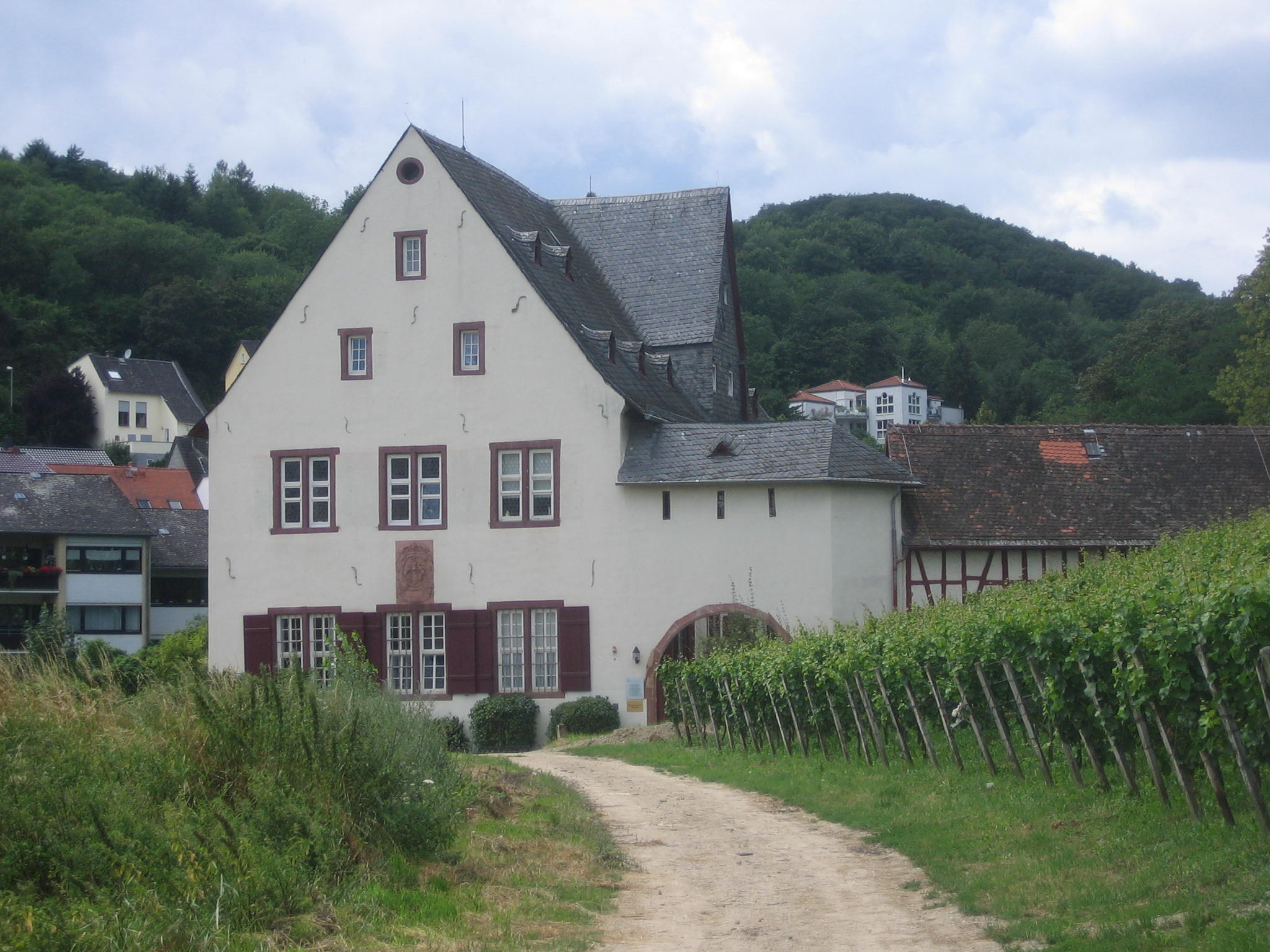 Bassenheimer Hof in Kiedrich, 1660 ließ der Mainzer Dompropst Adolf Hund von Saulheim, diese befestigte, mit Wehrgang und Schießscharten über dem Tor versehene Anlage erbauen.